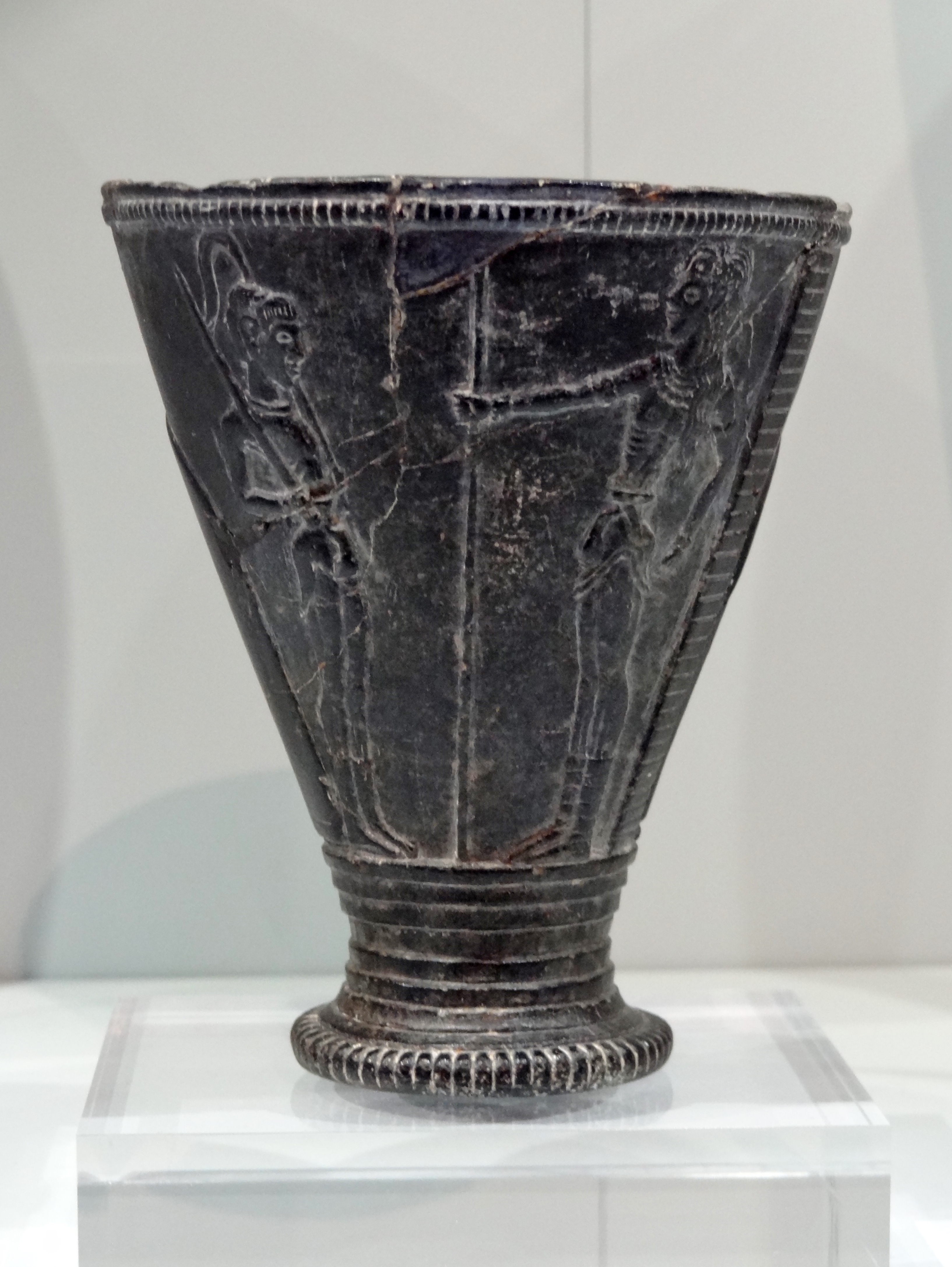 Sogenannter Prinzenbecher aus Serpentin mit Reliefszene, Höhe: 11,5 cm, Durchmesser: 9,9 cm (Neupalastzeit, 1500–1450 v. Chr.) aus Agia Triada, ausgestellt im Archäologischen Museum Iraklio, Kreta, Griechenland